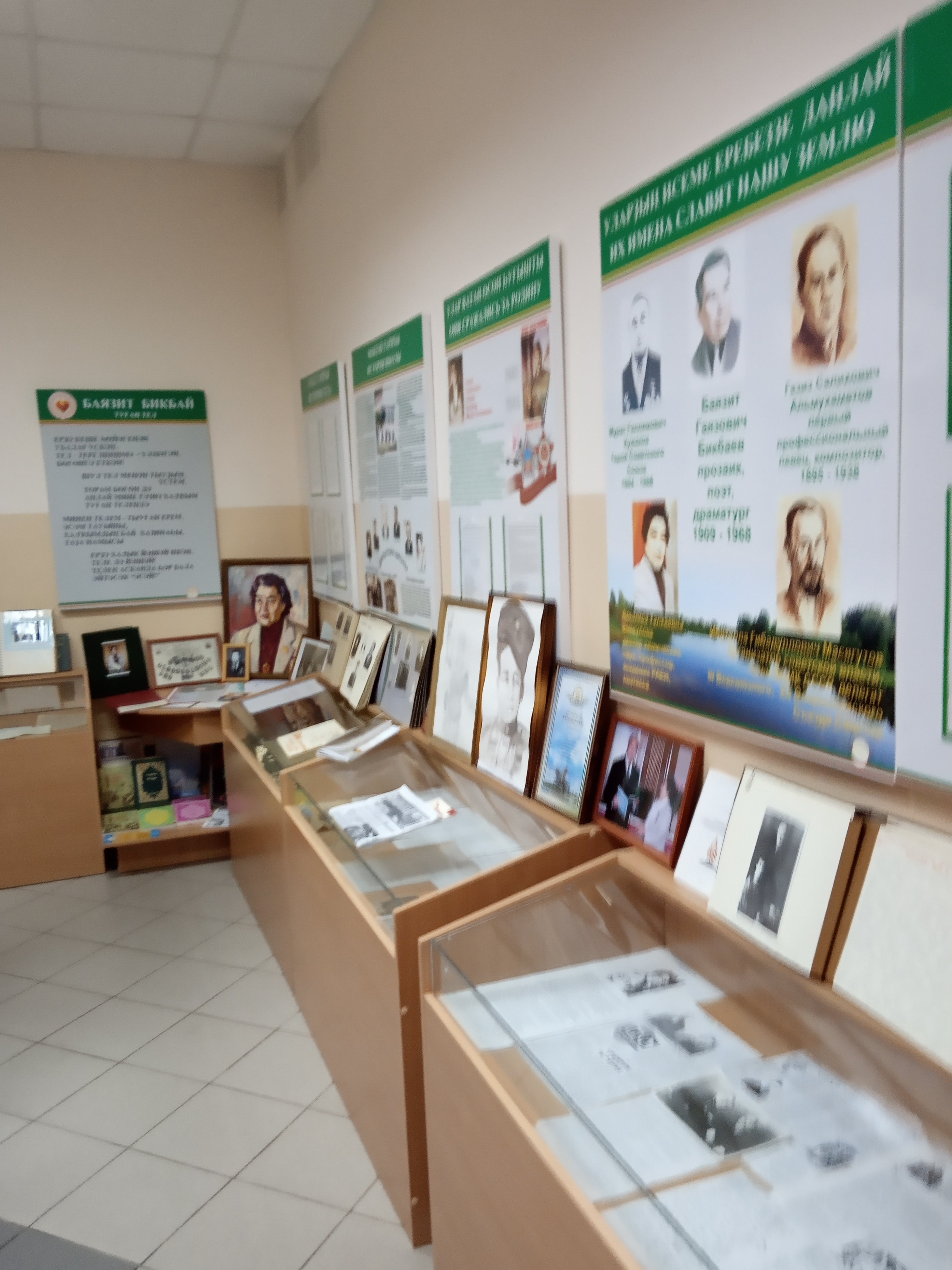 Башҡортса: Көйөргәҙе районы Мораптал ауылында мәктәп музейы